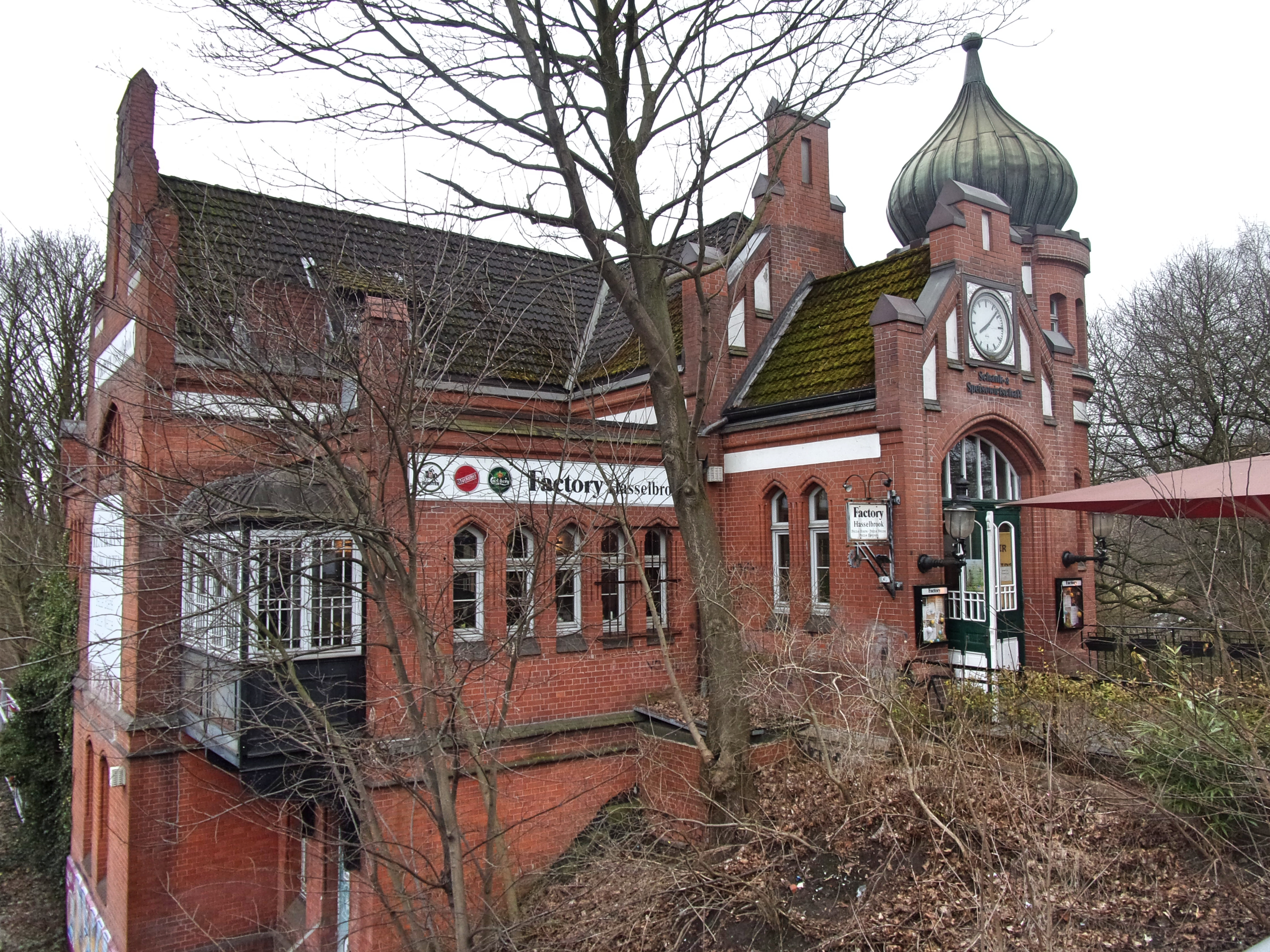 Ehemaliges Bahnhofsgebäude Hasselbrook, heute Gastronomiebetrieb Factory am Bahnhof Hasselbrook, Hamburg. This is a photograph of an architectural monument.